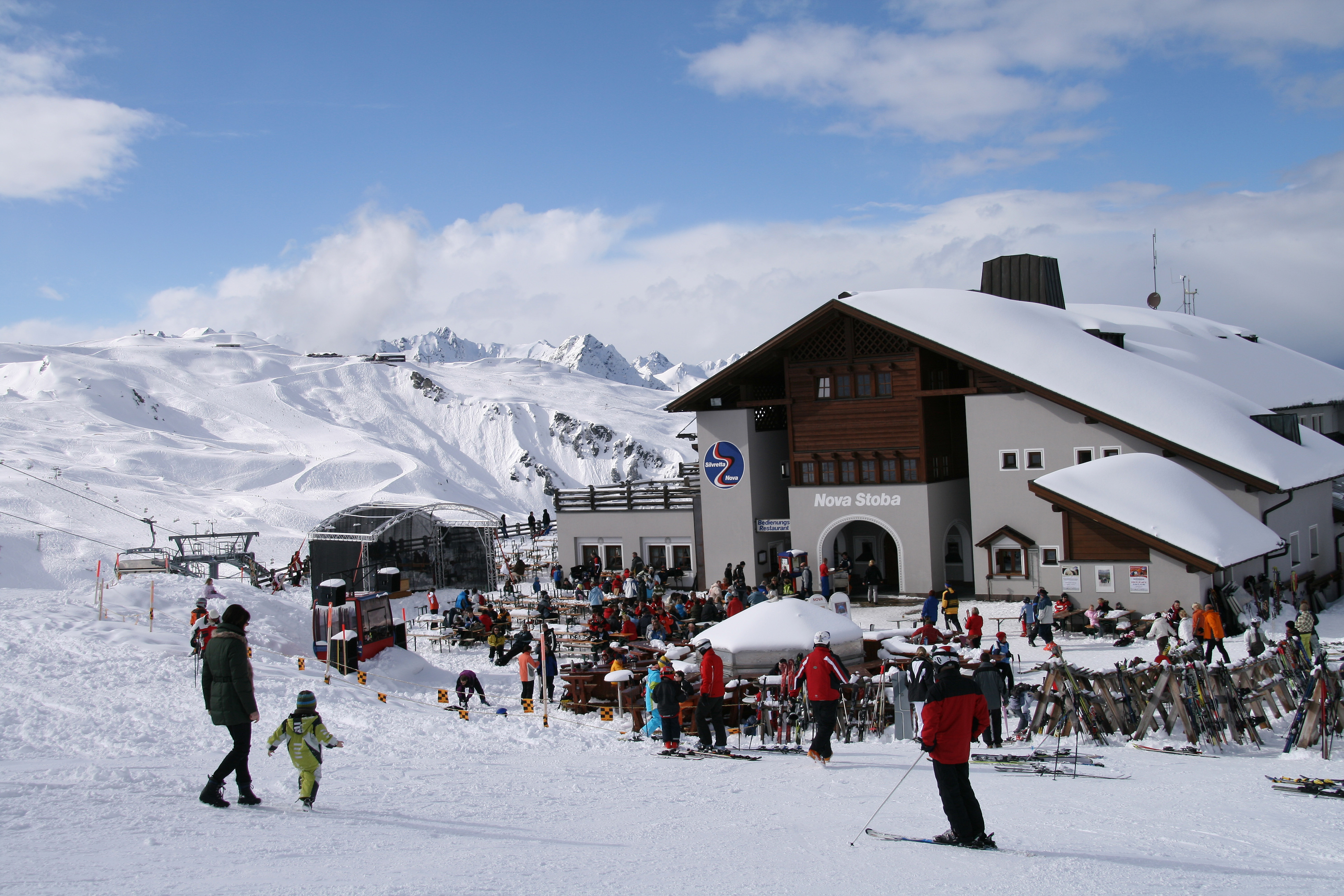 Nova Stoba im Montafoner Skigebiet auf der Silvretta in Vorarlberg. Im Hintergrund die Alp Nova.